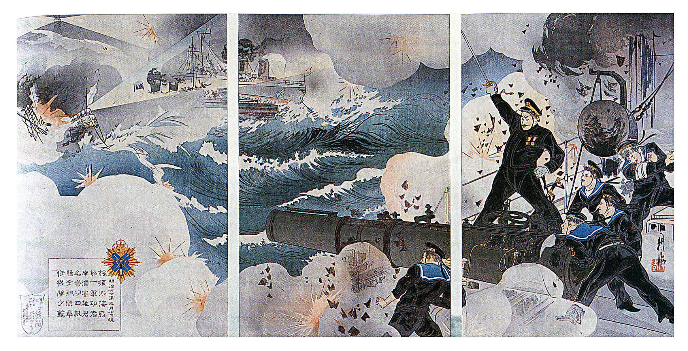 明治丗七年三月十日暁 旅順港海戰 第一軍功者 南澤安雄君 名誉功四級 賜金鵄勲章 任機関少藍 (四次旅順攻撃に於ける第一驅逐艦隊所属驅逐艦『霞』の奮戰)